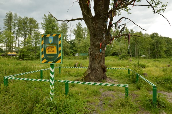 Дерево вільхи з дубом, Черкаський район, кв. 42 вид. 7 Свидівського л-ва по трасі Черкаси-Канів